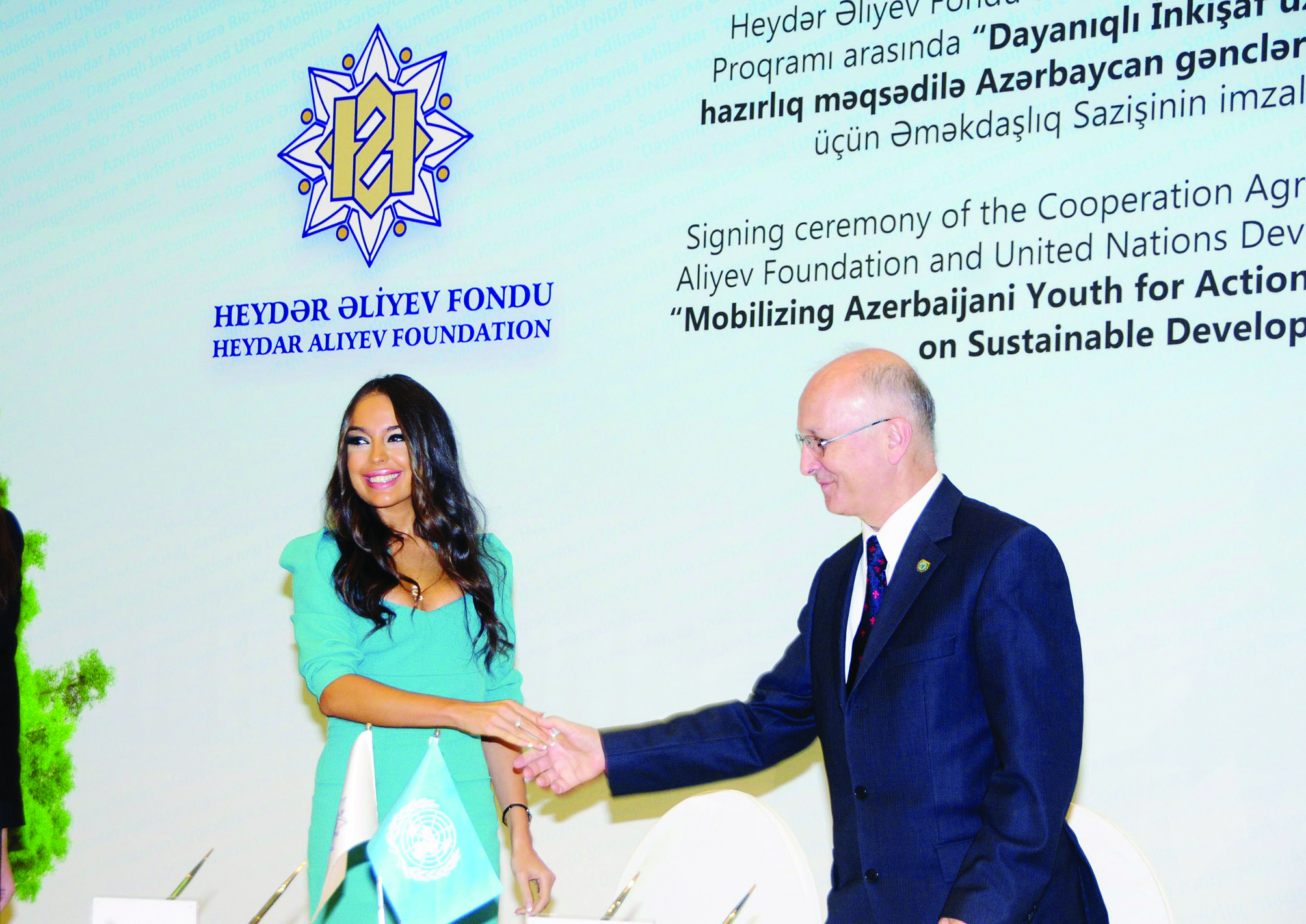 Heydər Əliyev Fondu ilə BMT-nin İnkişaf Proqramı arasında “2012-ci ildə keçiriləcək Rio+20 konfransına hazırlıq məqsədilə Azərbaycan gənclərinin səfərbər edilməsi” adlı Anlaşma Memorandumunun imzalanması mərasimi. 21 oktyabr 2011-ci il.